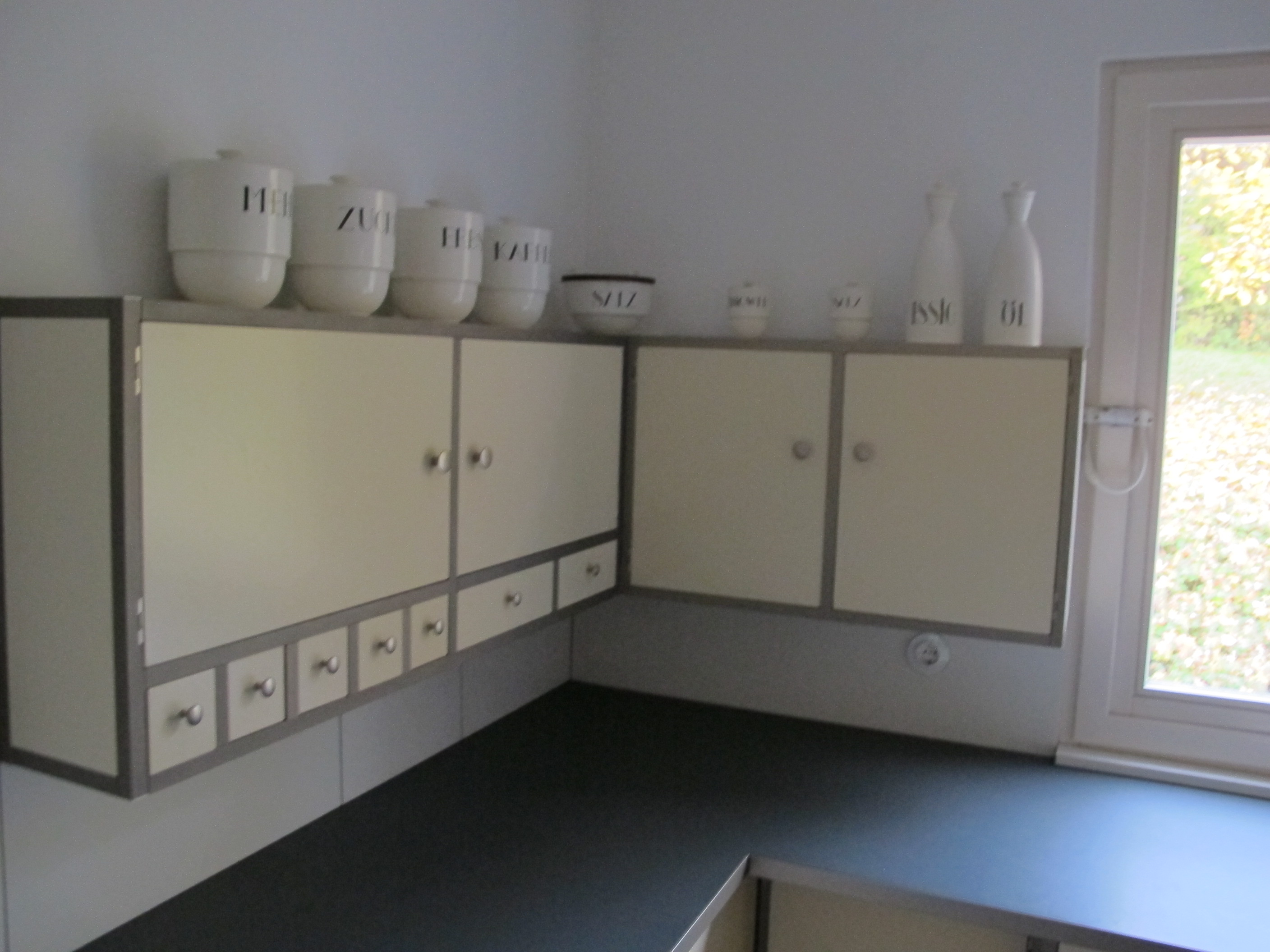 Haus am Horn, interior, küche